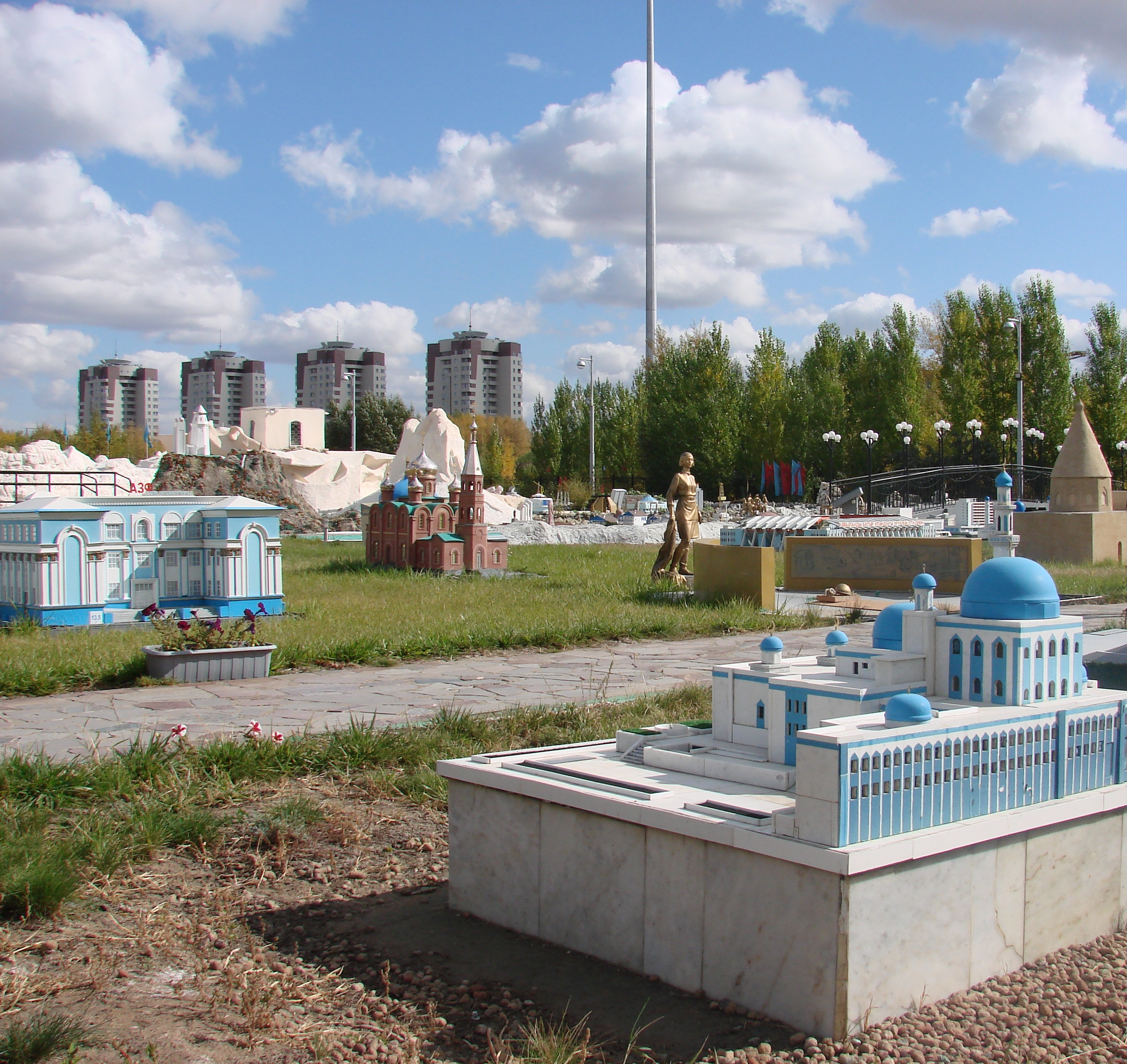 Этно-мемориальный комплекс «Карта Казахстана Атамекен»